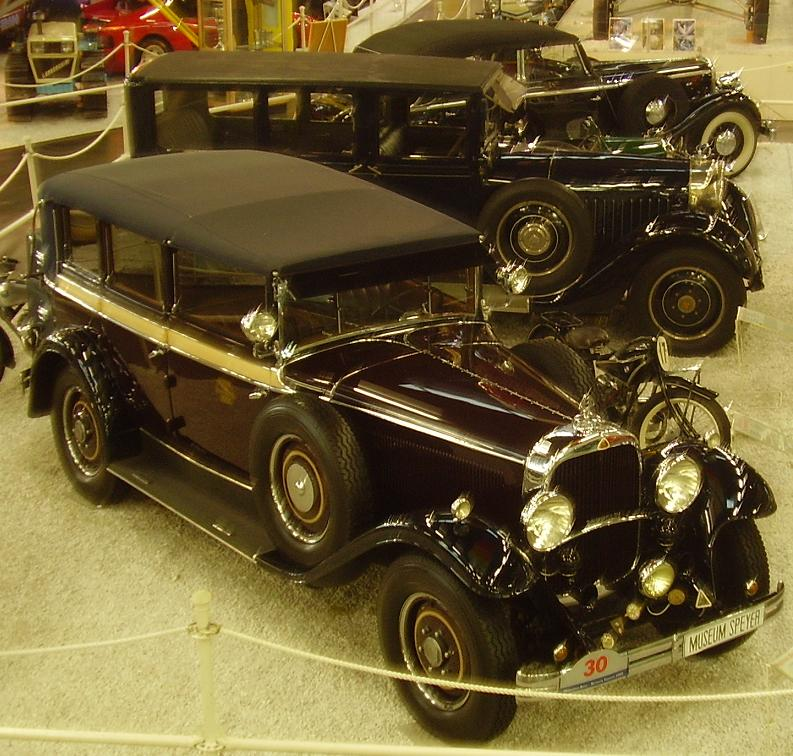 Maybach Zeppelin DS7at the Sinsheim Auto & Technik Museum (Sinsheim / Germany)